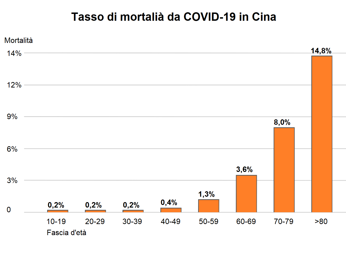 Tabella raffigurante asso di mortalità da Covid-19 in Cina in base a differenti fasce d'età